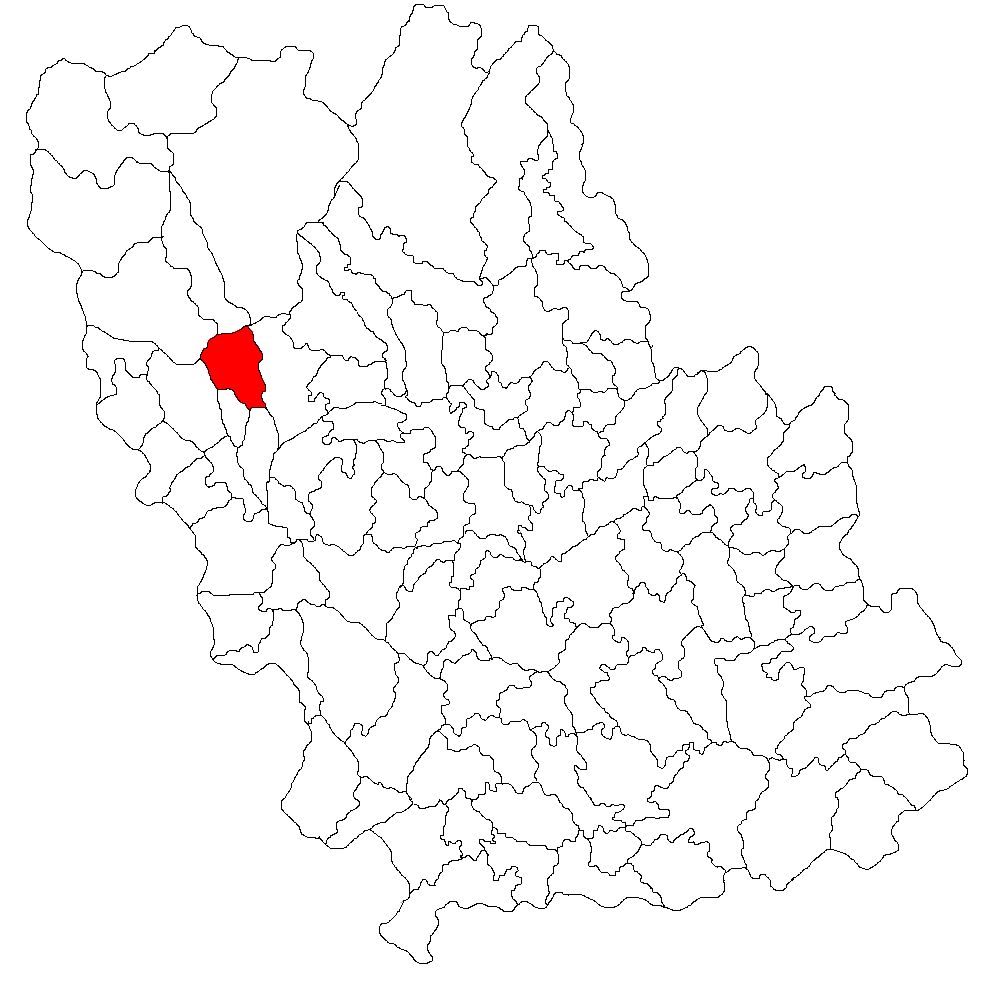 Categorie:Hărţi ale judeţului Prahova